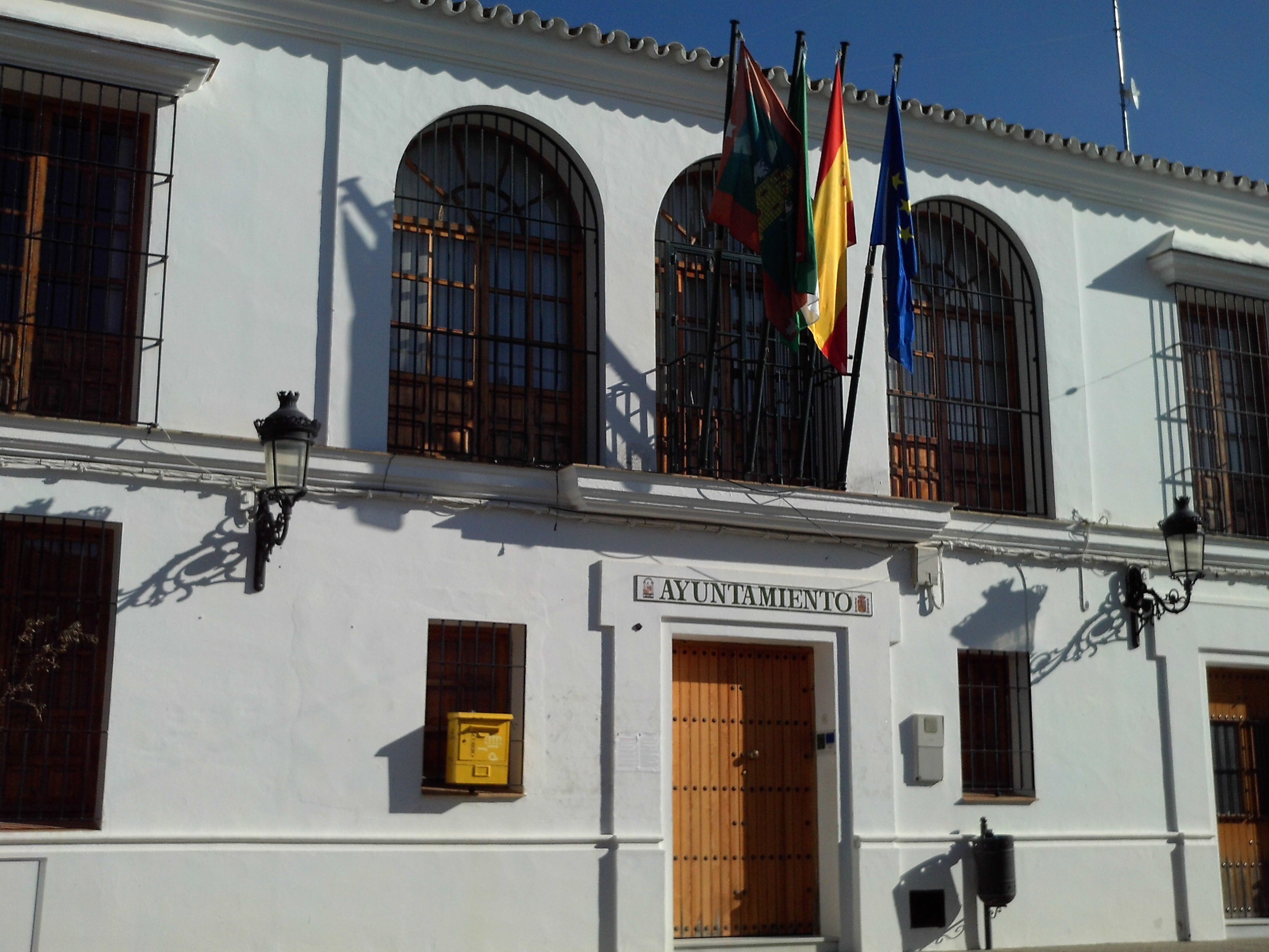 Ayuntamiento de la localidad sevillana de Castilleja del Campo